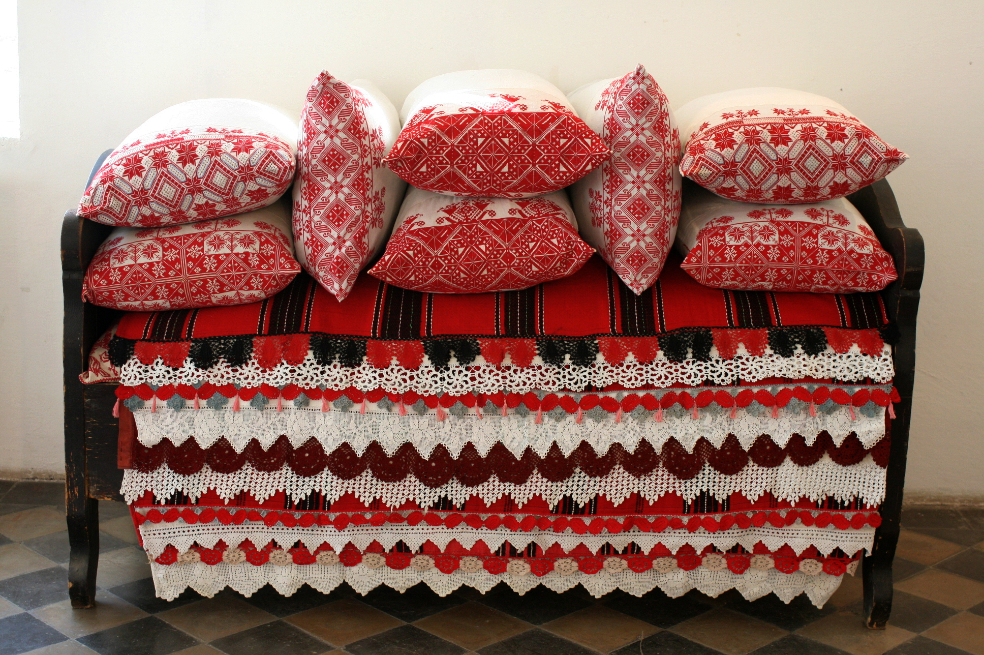 Árapataki vetett ágy rekonstrukciója a Székely Nemzeti Múzeumban (Sepsiszentgyörgy, Erdély)